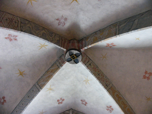 Gewölbemalerei in der Ritterkapelle